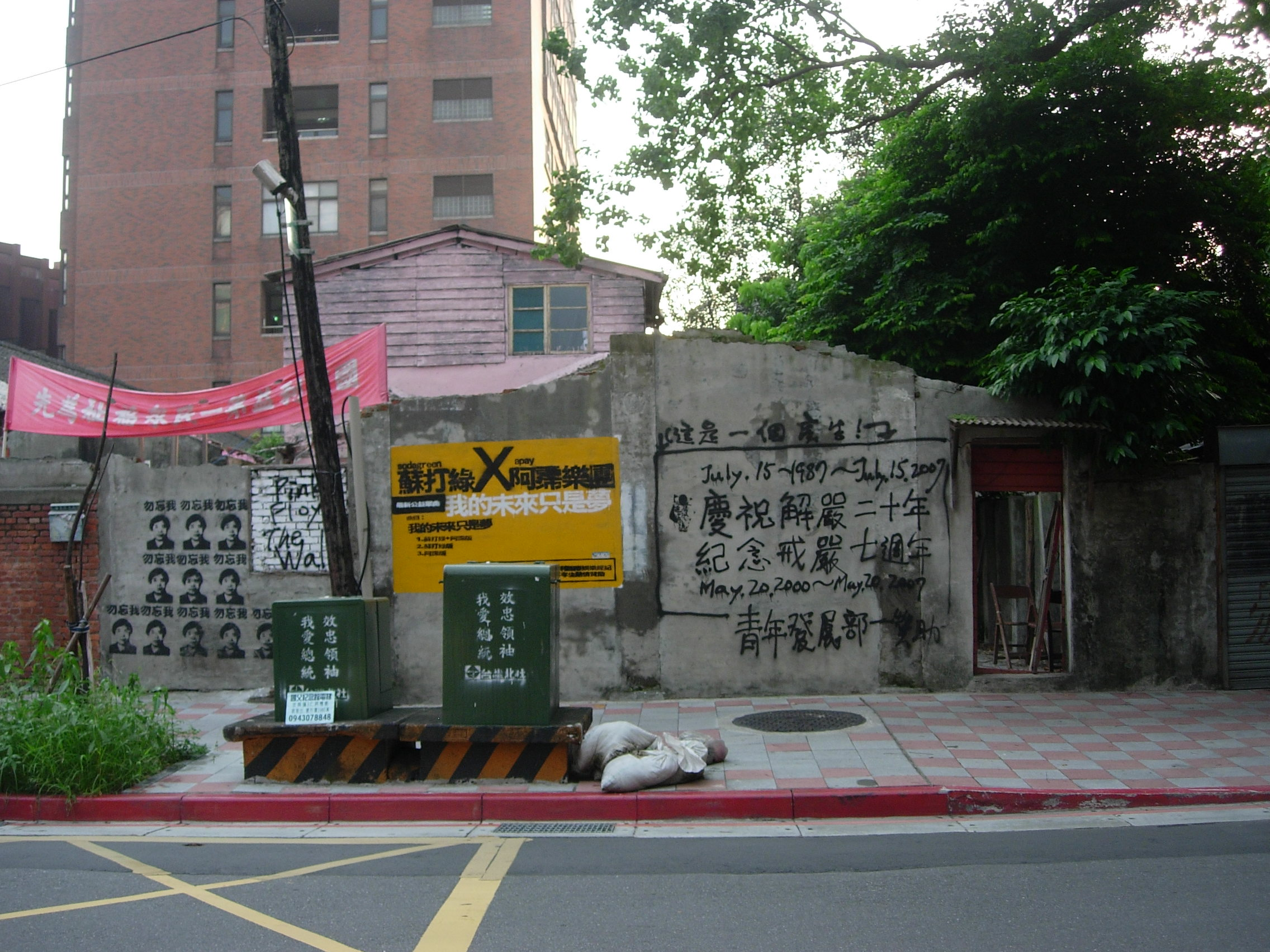 臺北市大安區敦南街（原基隆路三段4巷）「效忠領袖、我愛總統」塗鴉事件，反諷民主進步黨執政不如人意，也反諷台灣北社大力支持陳水扁。2017年5月30日，前民主進步黨文宣部主任陳芳明、東吳大學教授陳瑤華、國立陽明大學教授黃嵩立、國立東華大學教授施正鋒、作家朱天衣等人公開聲援原住民族轉型正義小教室在凱達格蘭大道紮營抗議行動，陳芳明承認，蔡英文政府的轉型正義已經偏離軌道，民主進步黨的理念與作法背離解嚴目標越來越遠，下星期他將過70歲生日，但他不敢許下生日願望，「因為願望早已幻滅」。